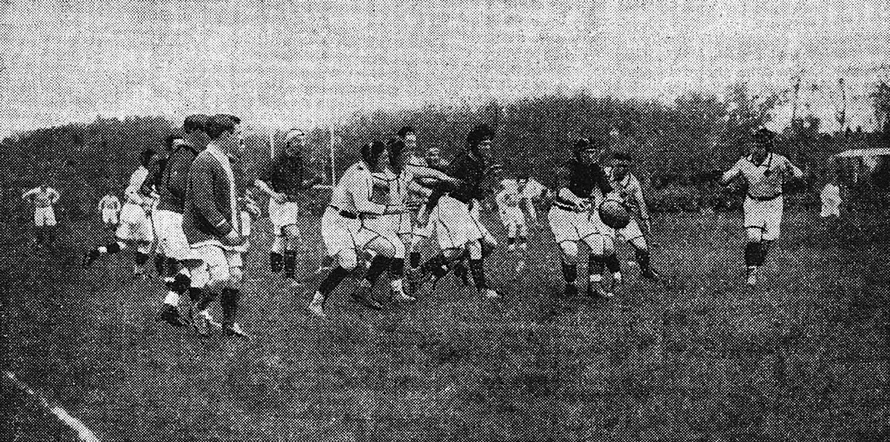 1921 (17 avril), finale du championnat de France de rugby à Béziers, victoire de Perpignan sur le Stade toulousain.